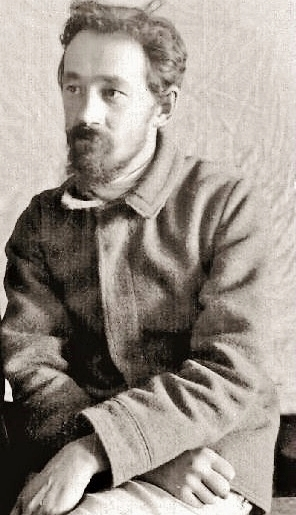 Egor S. Sozonov (1879-1910) durante la prigionia